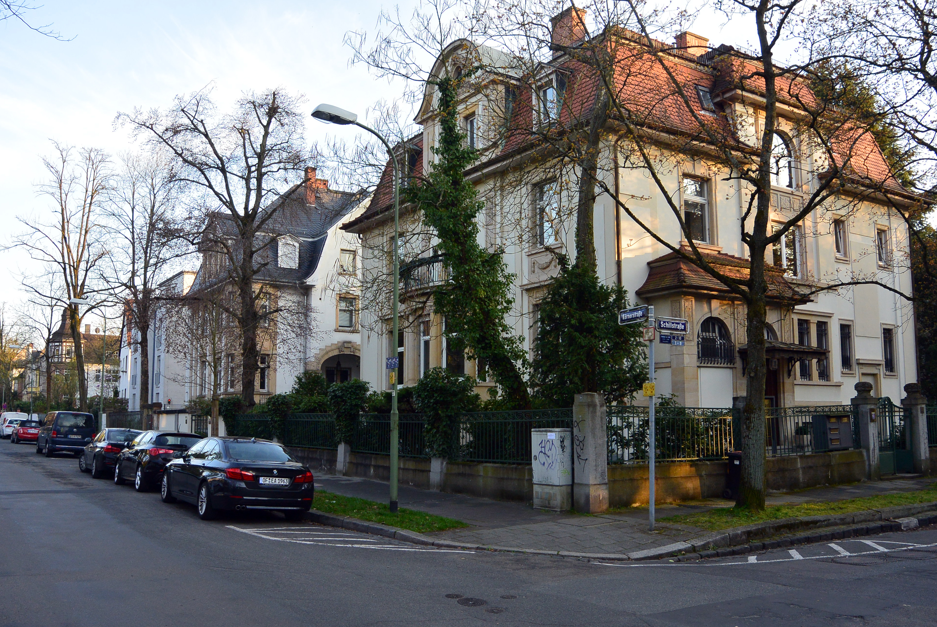 Die Körnerstraße im Westend Offenbachs. Aufnahme von Norden nach Süden